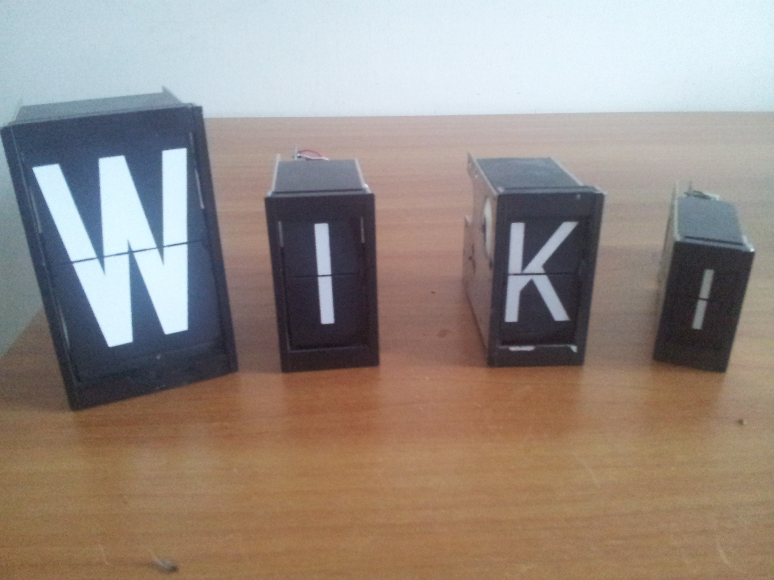 Gruppi di Informazione per Teleindicatore a Palette da 100mm(sinistra), 60mm(centro) e 35mm(destra)